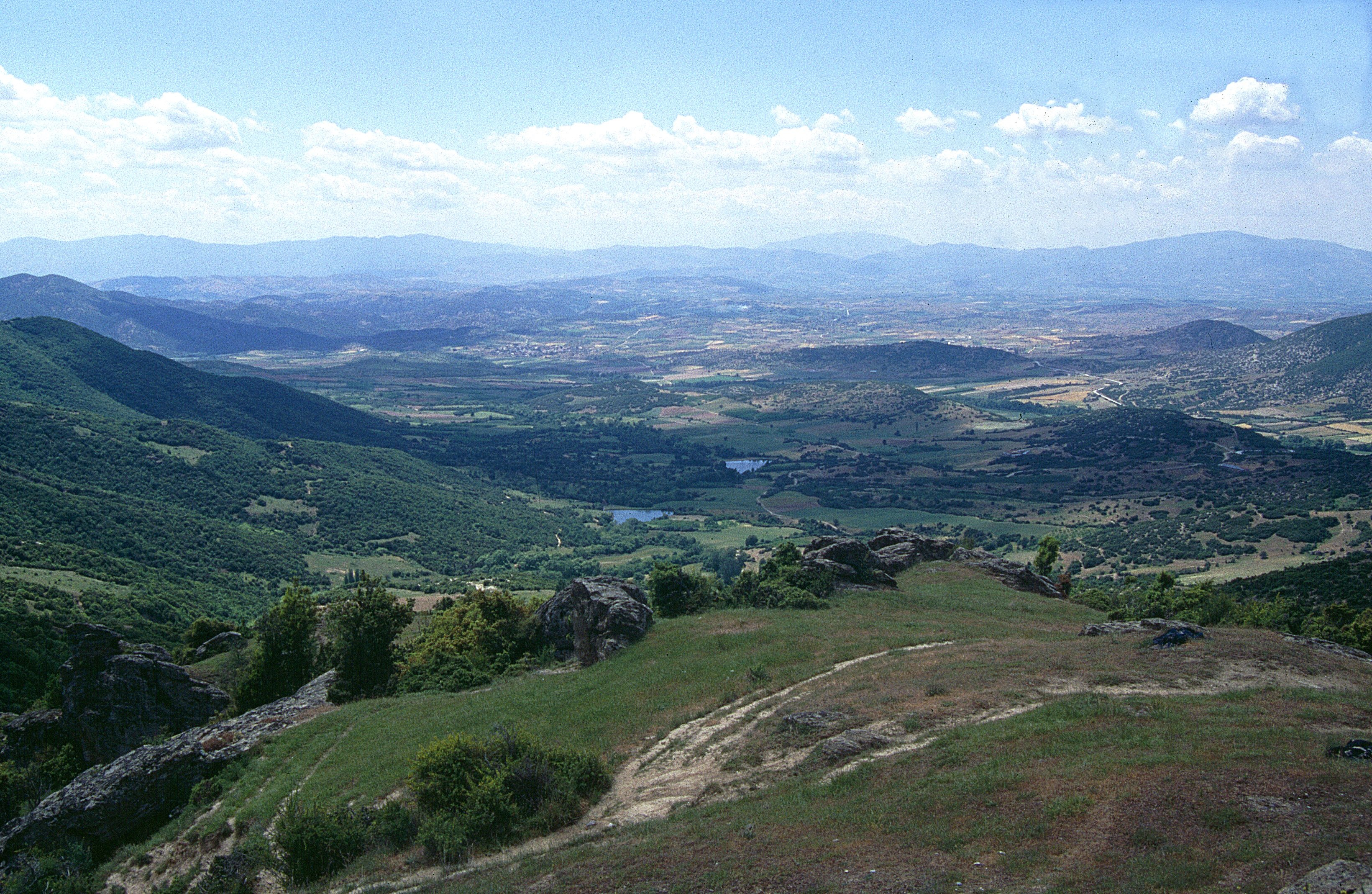 Pieria-Bergland